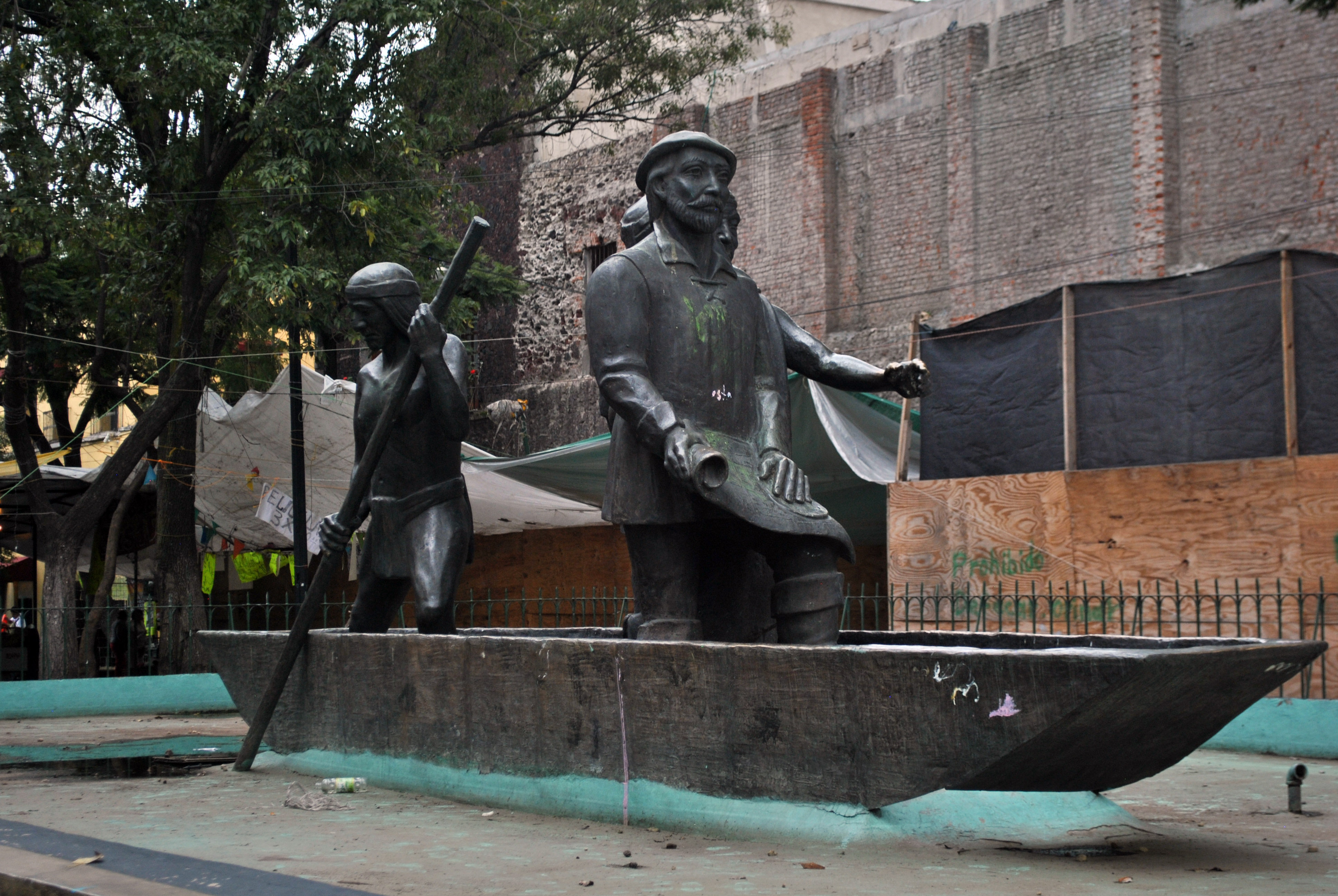 Escultura de Alonso García Bravo y dos indígenas mexicas en la plaza del mismo nombre, Centro Histórico de la Ciudad de México.